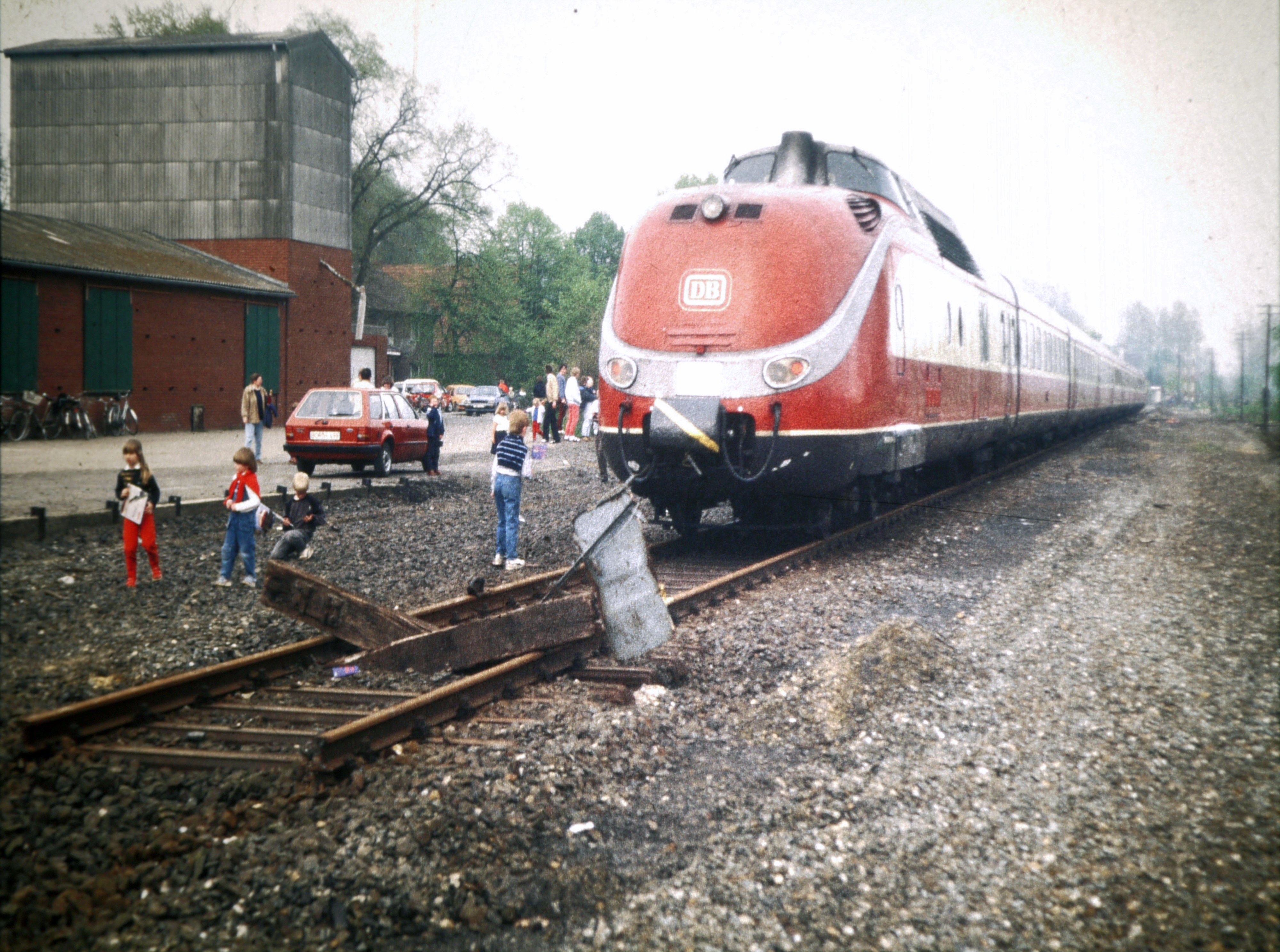 Letzte Bahnfahrt von Gescher nach Coesfeld am 11.5.1985